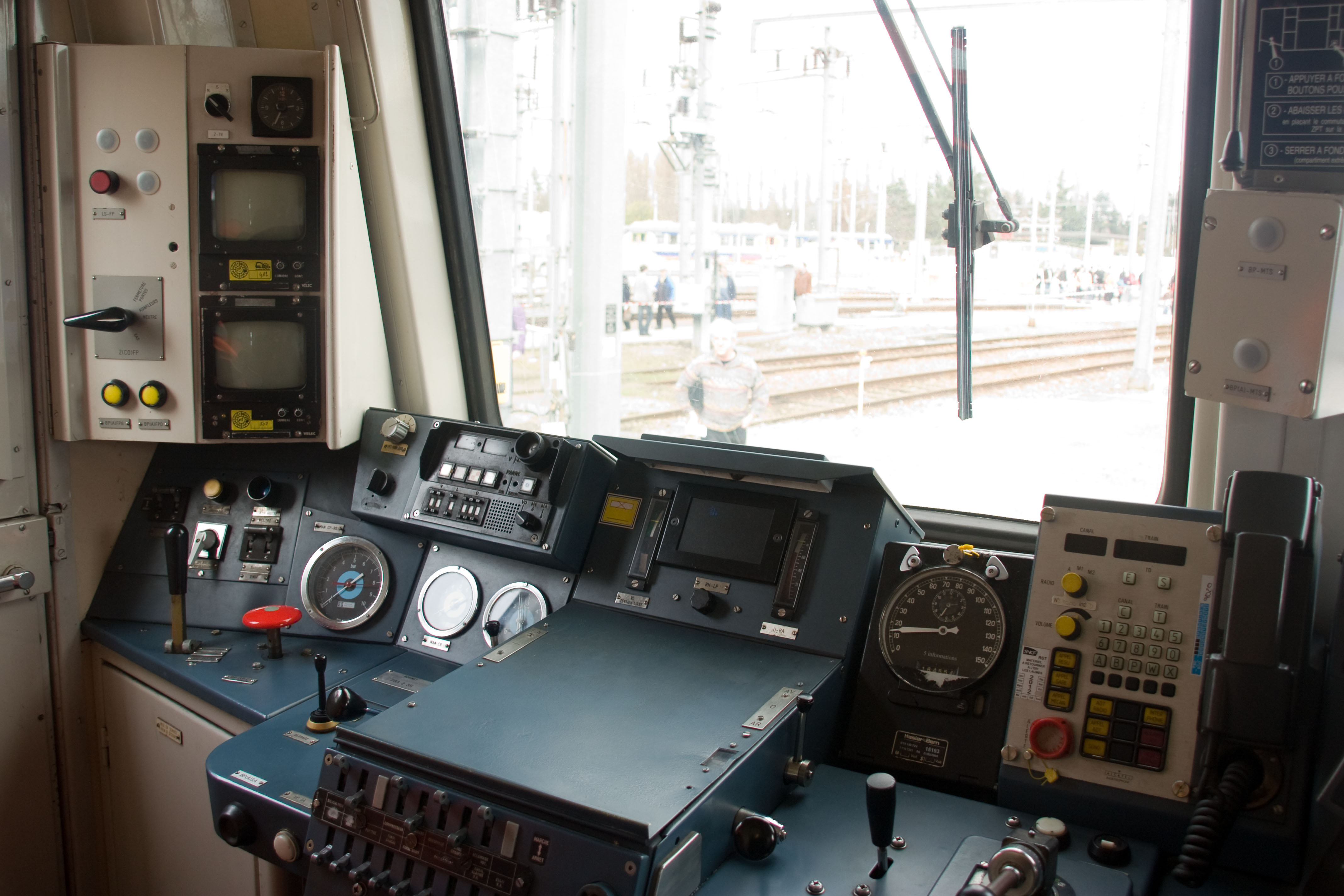 Journée Porte Ouverte du 20 mars 2010 au technicentre Paris Nord-Joncherolles, Villetaneuse, Seine-St-Denis, France